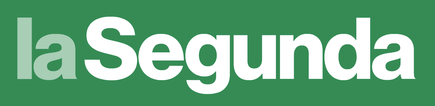 Reproducción del logotipo usado por el diario vespertino chileno La Segunda desde el 6 de junio de 2014.